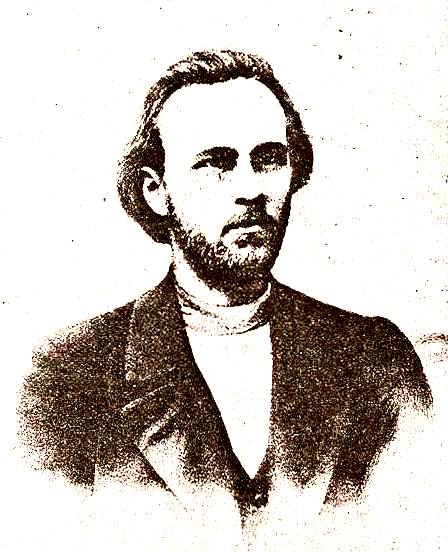 Первый председатель Петербургского Совета рабочих депутатов Г. С. Хрусталёв-Носарь (1877-1919)